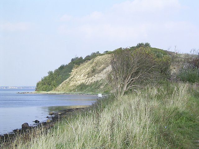 Holnis Kliff (Steilküste), Glücksburg, Schleswig-Holstein